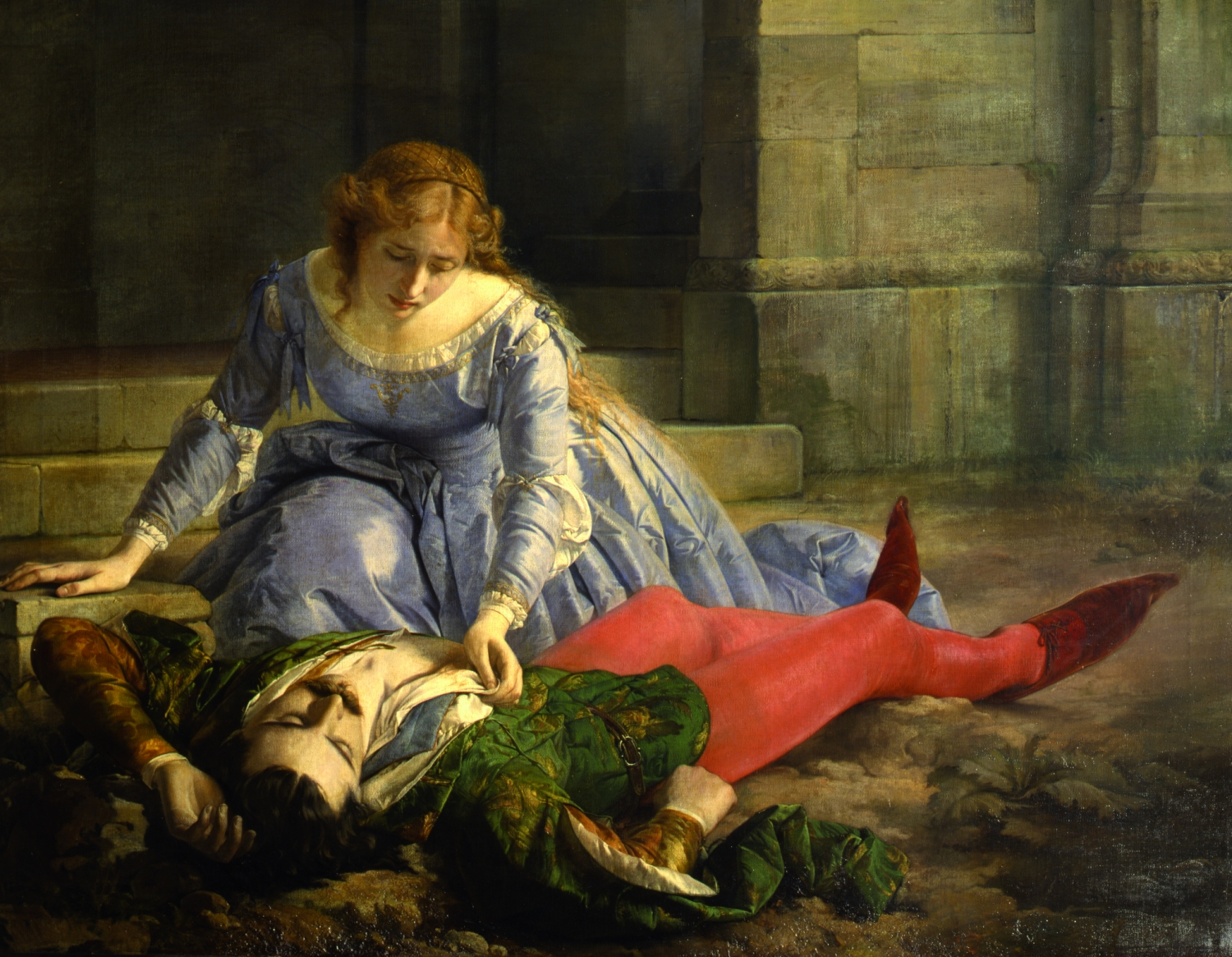 Pacifico Buzio, Imelda de' Lambertazzi presso il cadavere dell'amato, olio su tela, Musei civici, Pavia. Nel 1864 il quadro è premiato al Concorso Frank, diventando così proprietà del Municipio. L'opera rappresenta l'epilogo del romanzo "I Lambertazzi e i Geremei", pubblicato nel 1830 da Defendente Sacchi.